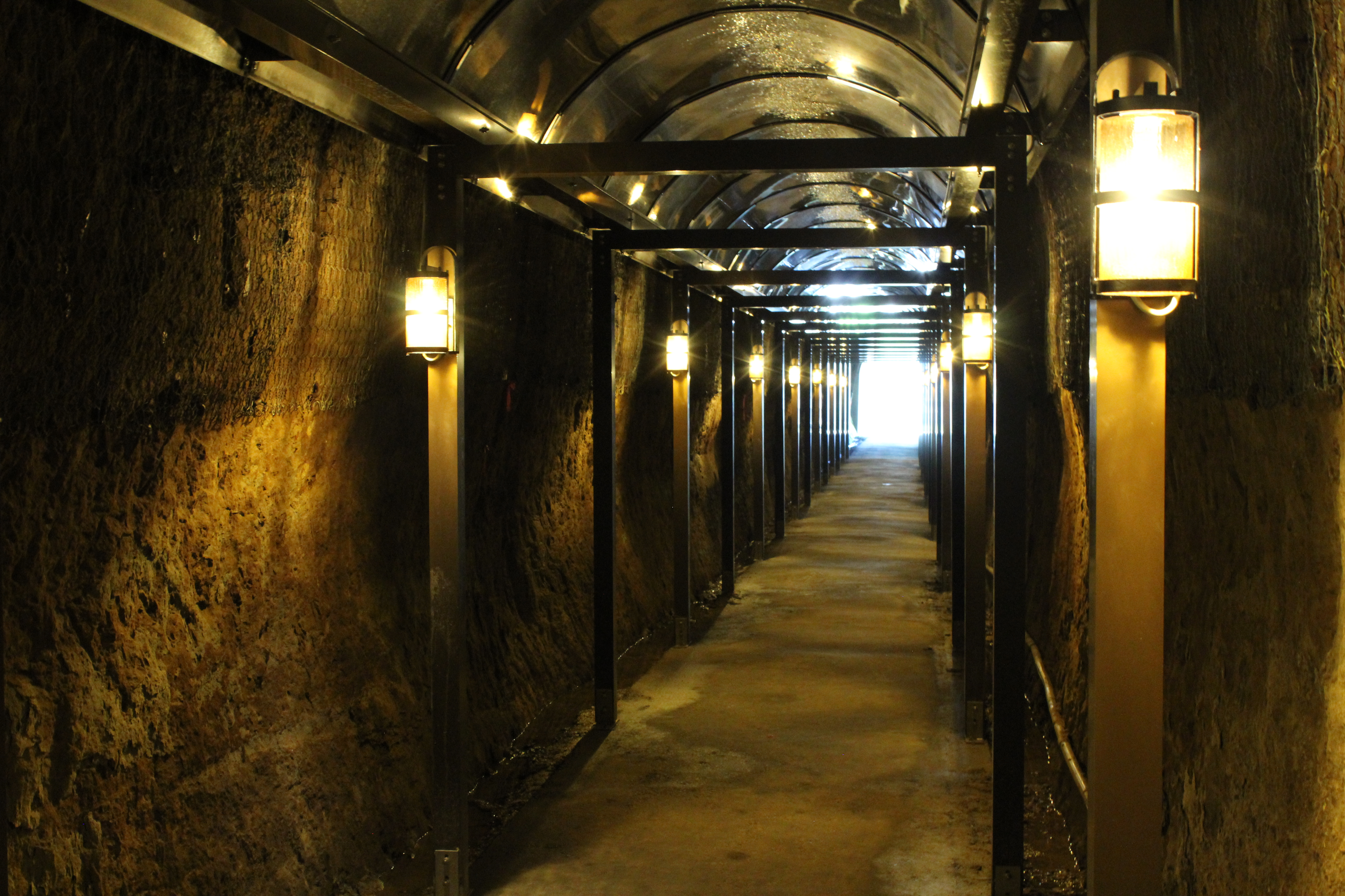 中山隧道（通路奥より入り口方向） Canon EOS Kiss X5